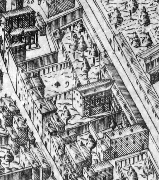 Pianta del buonsignori, dettaglio 049 casino del gran duca (casino di san marco)